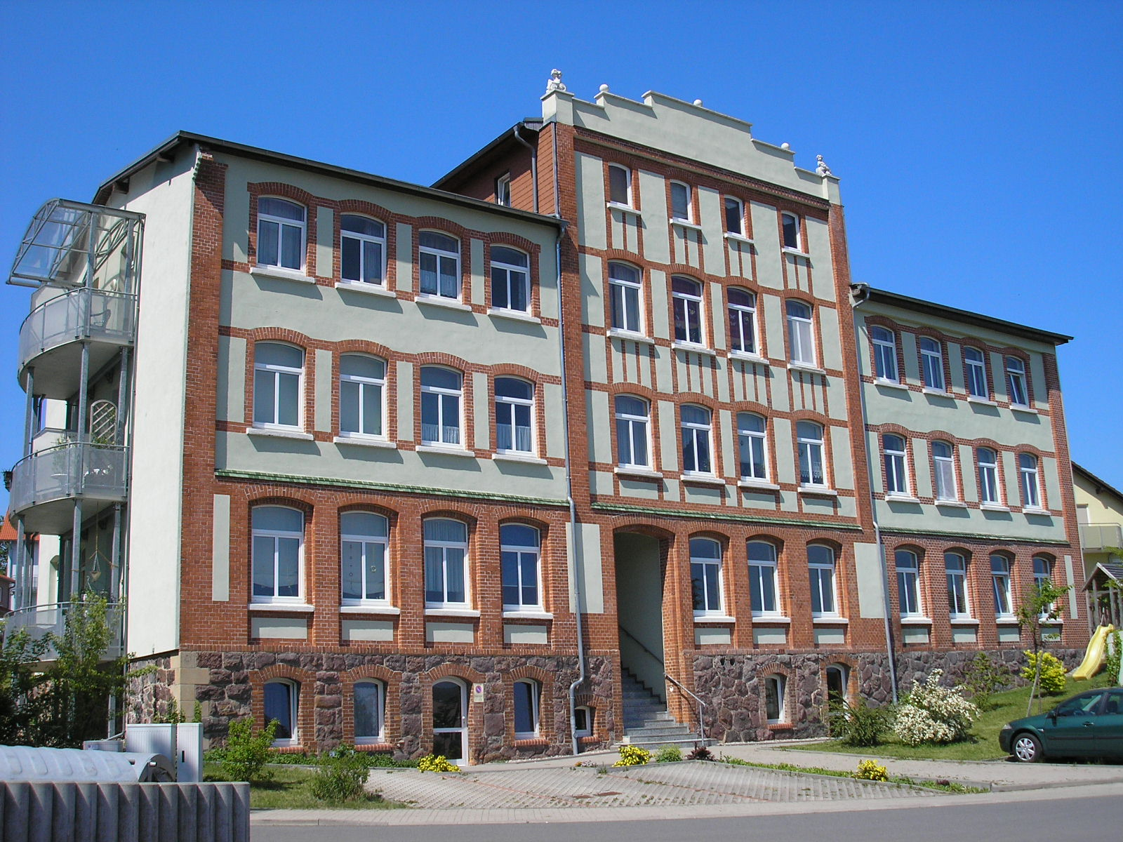 Ehemalige Porzellanfabrik Arno Fischer am Bahnhof in Ilmenau. Heute Nutzung als Wohnhaus.